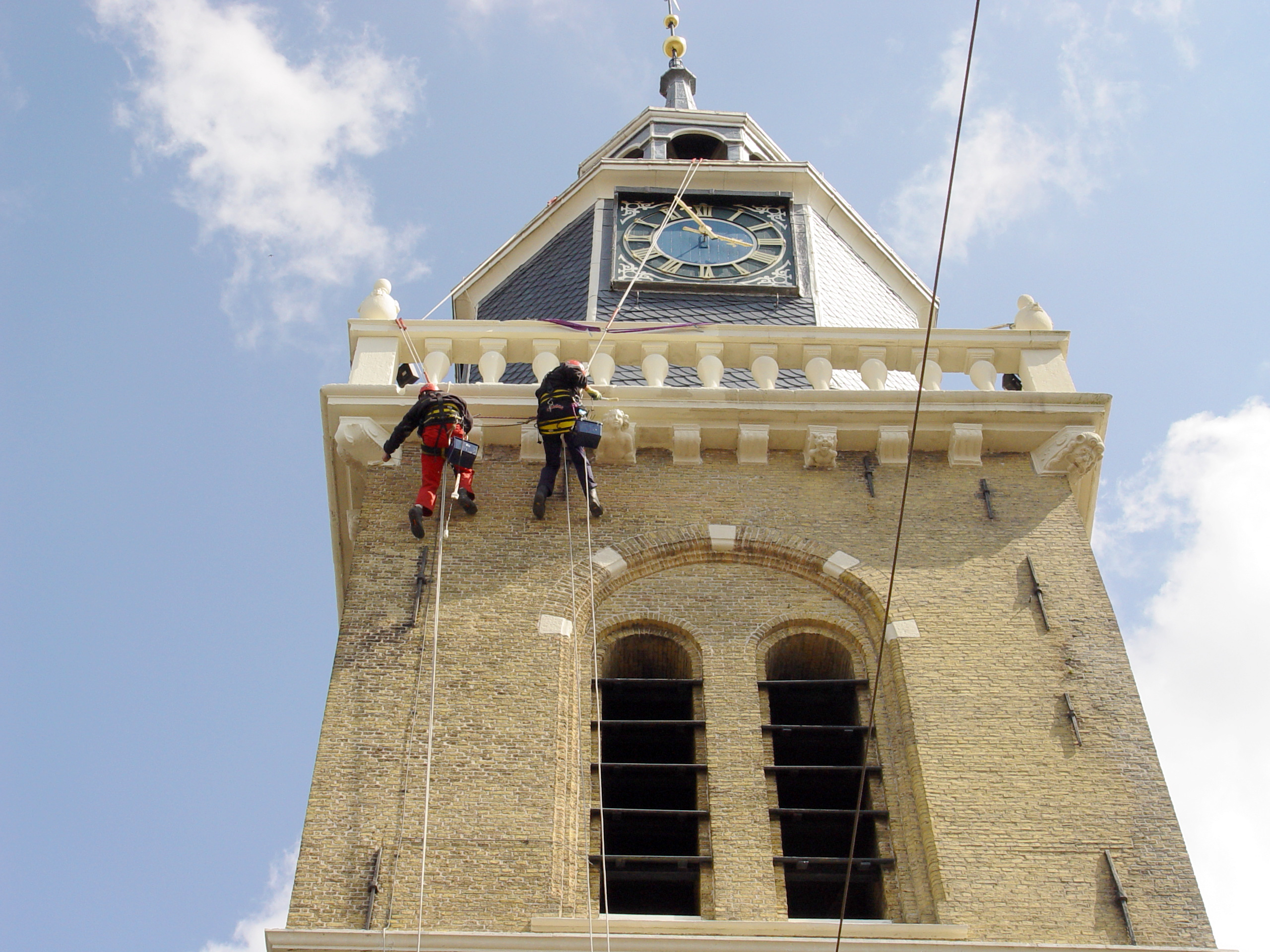 Joure - Hobbe van Baerdt Tsjerke - 2009